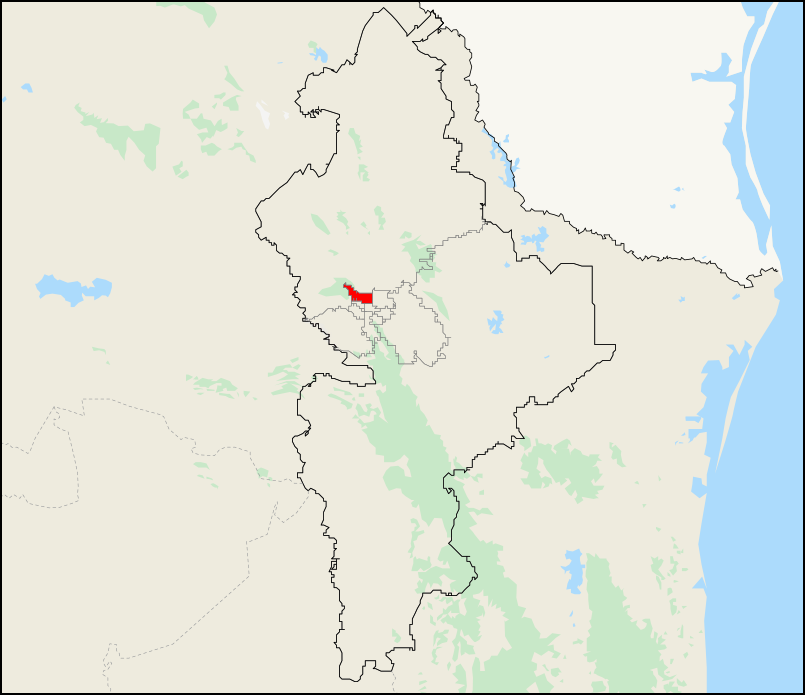 Mapa del distrito electoral federal 3 ubicado en Nuevo León